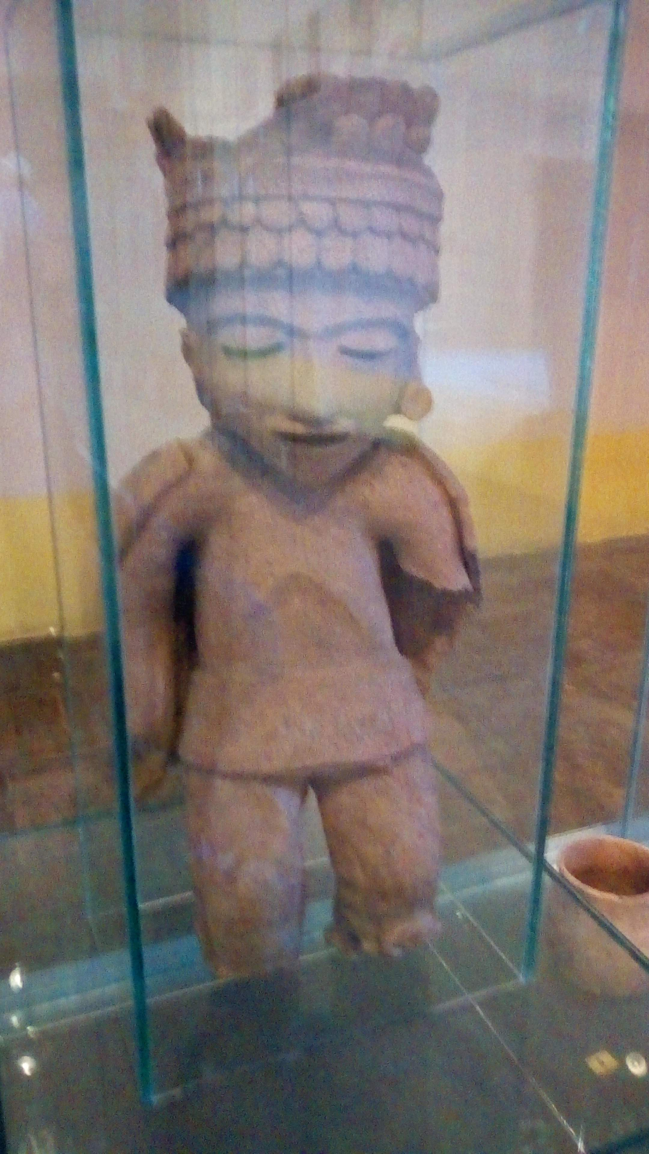 Estatuachilcal